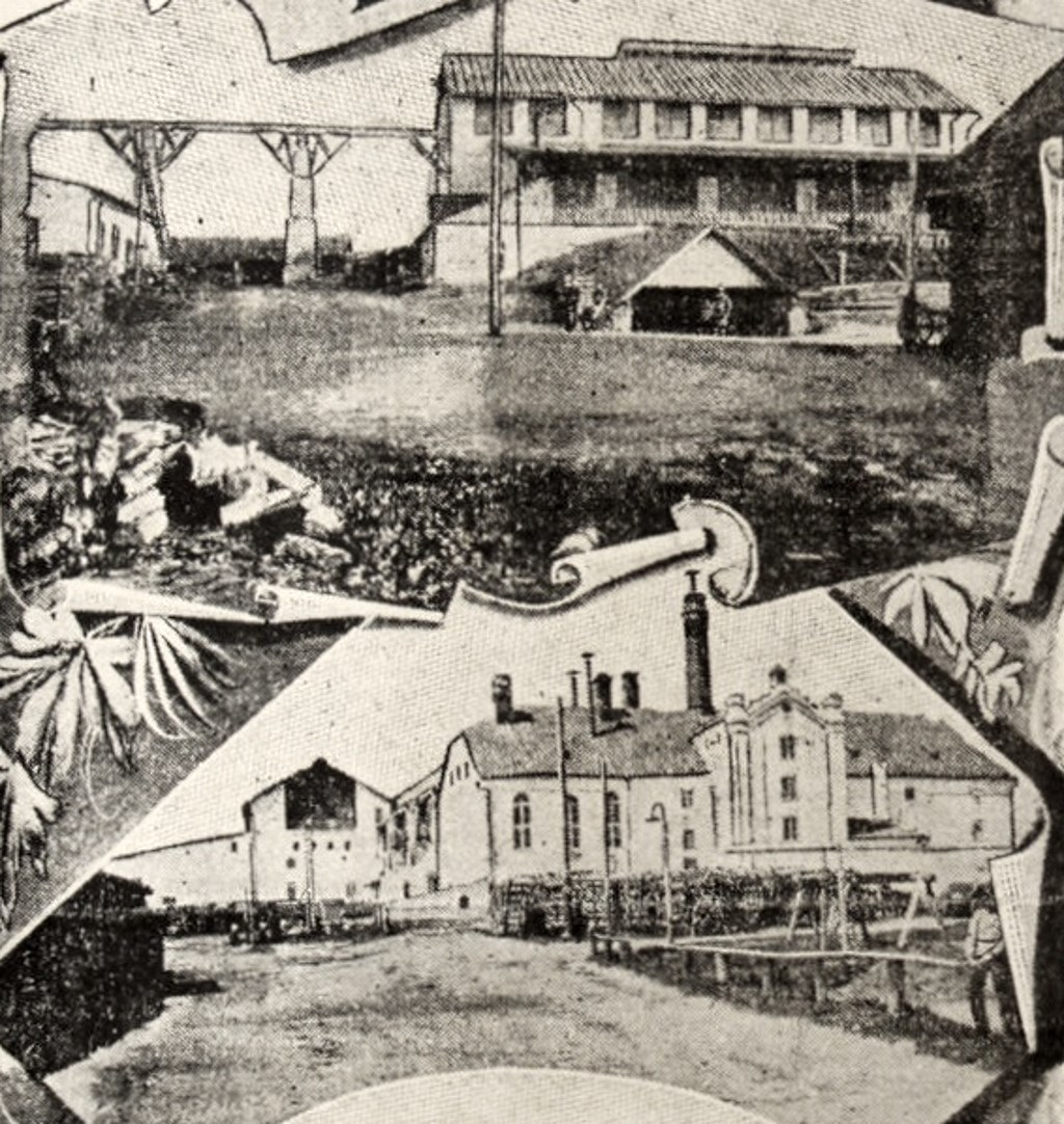 Беларуская (тарашкевіца): Магілёў (Mahiloŭ), Лупалава (Łupałava). Бровар Лекерта